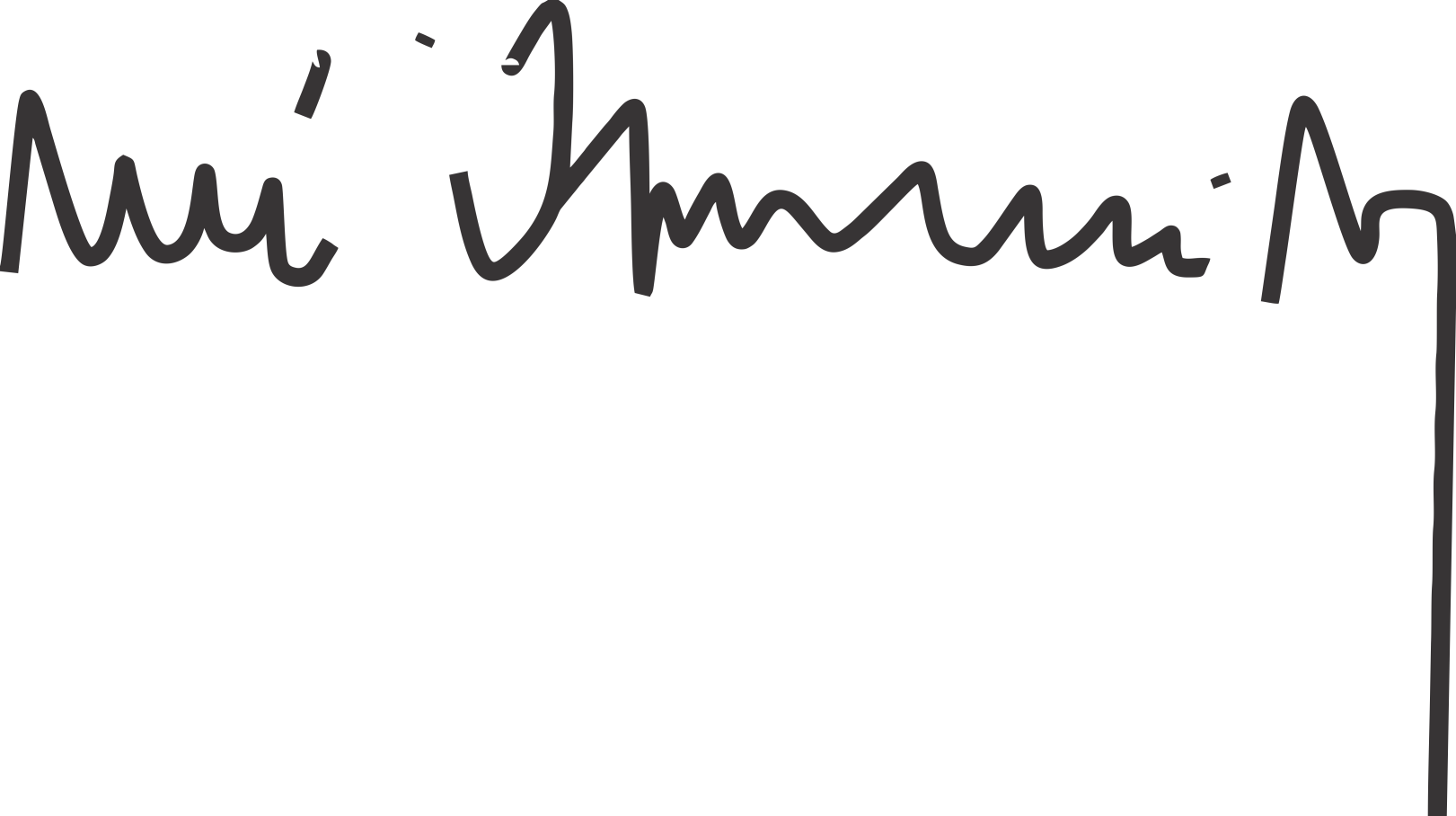 Autografo do politico brasileiro José Aparecido de Oliveira.